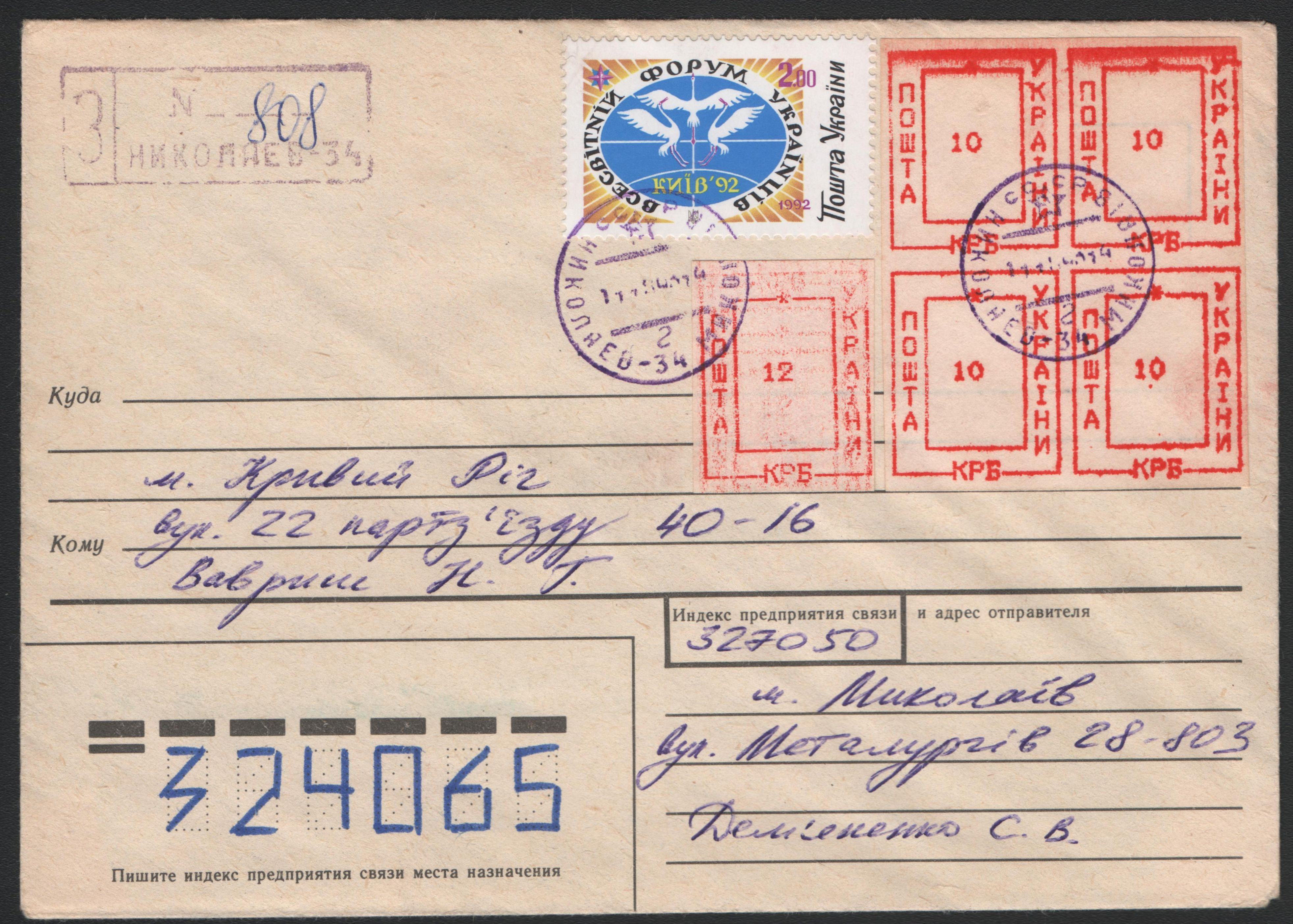 Почтовый конверт Украины с Провизориями Украины